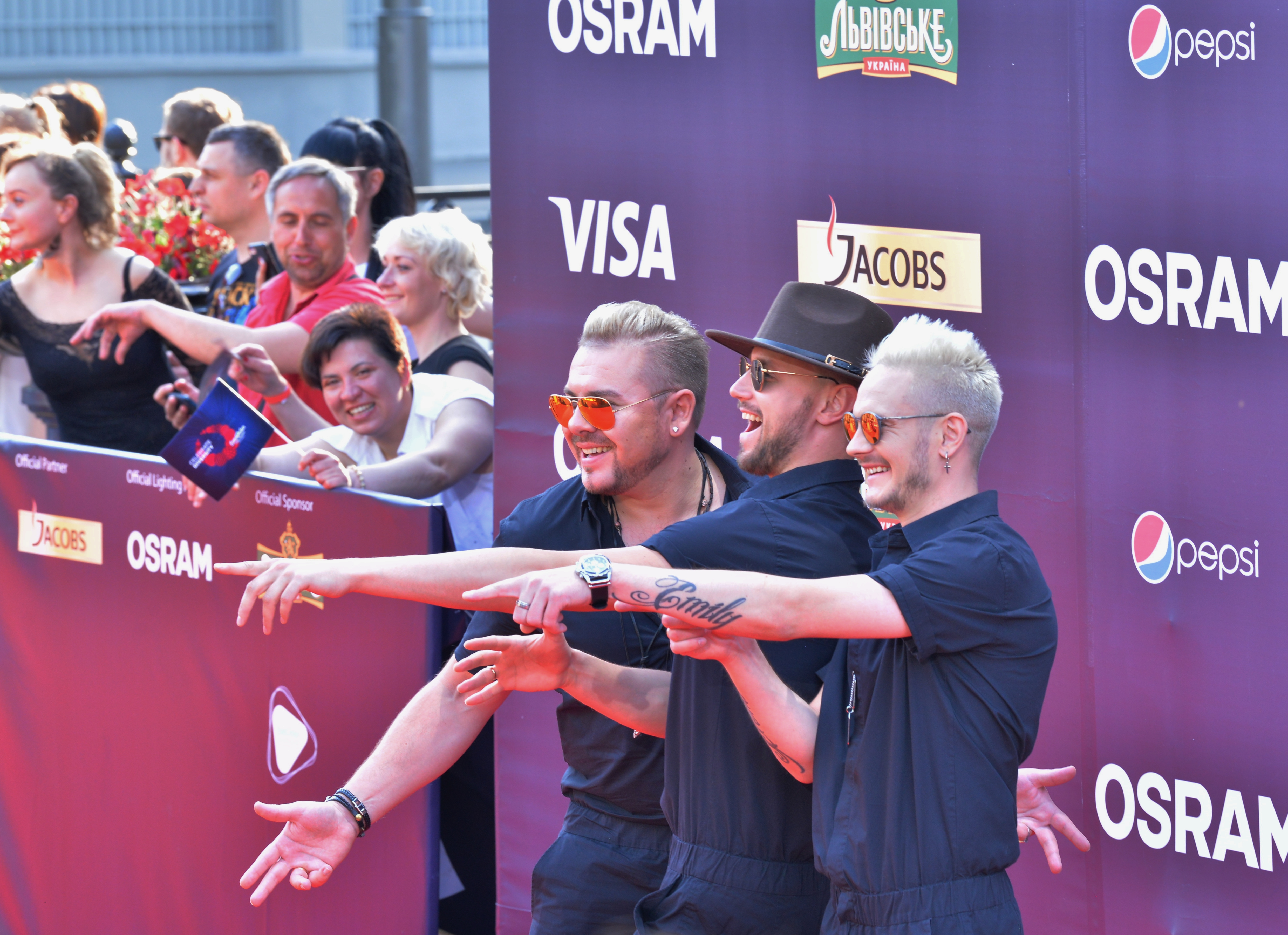 Молдовська група Sunstroke Project на церемонії відкриття пісенного конкурсу Євробачення 2017 у Києві